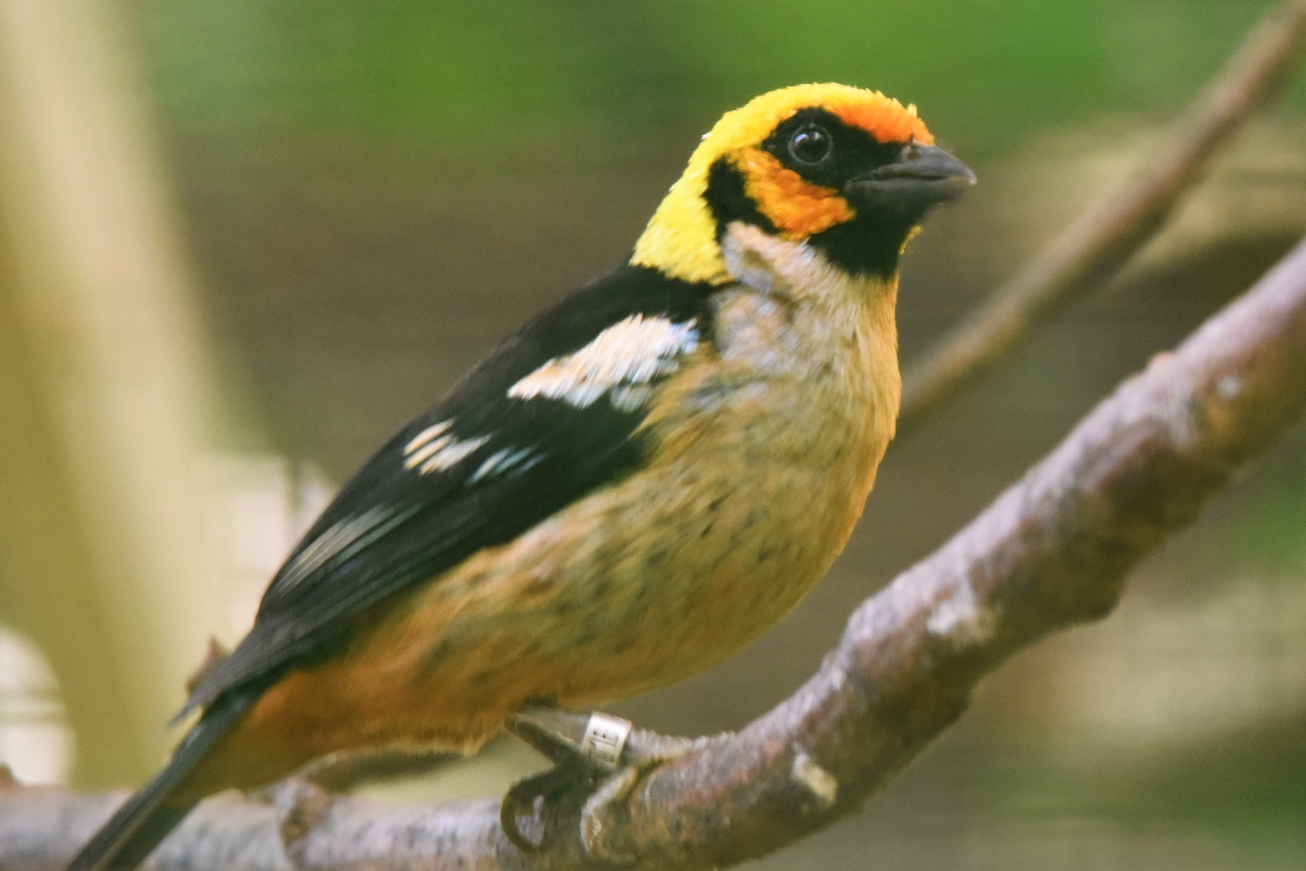 Tangara parzudakii lunigera Aufnahme Vogelpark Walsrode